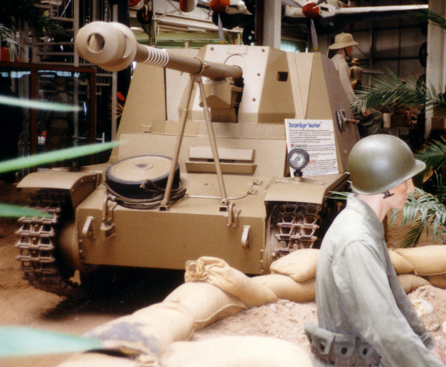 Beschreibung: Marder II (Sd.Kfz.131)